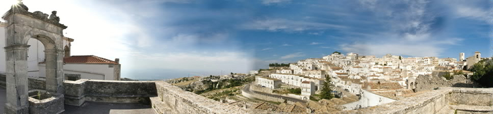 junno montesantangelo